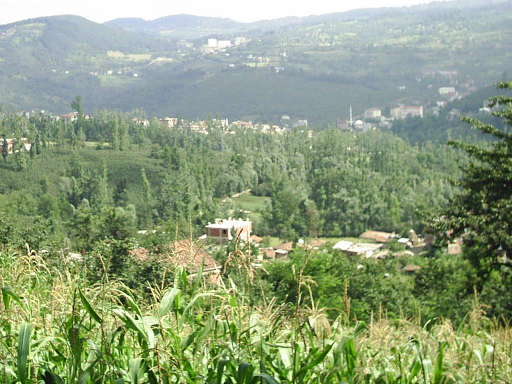 Bu fotoğraf tarafımdan çekilmiştir.